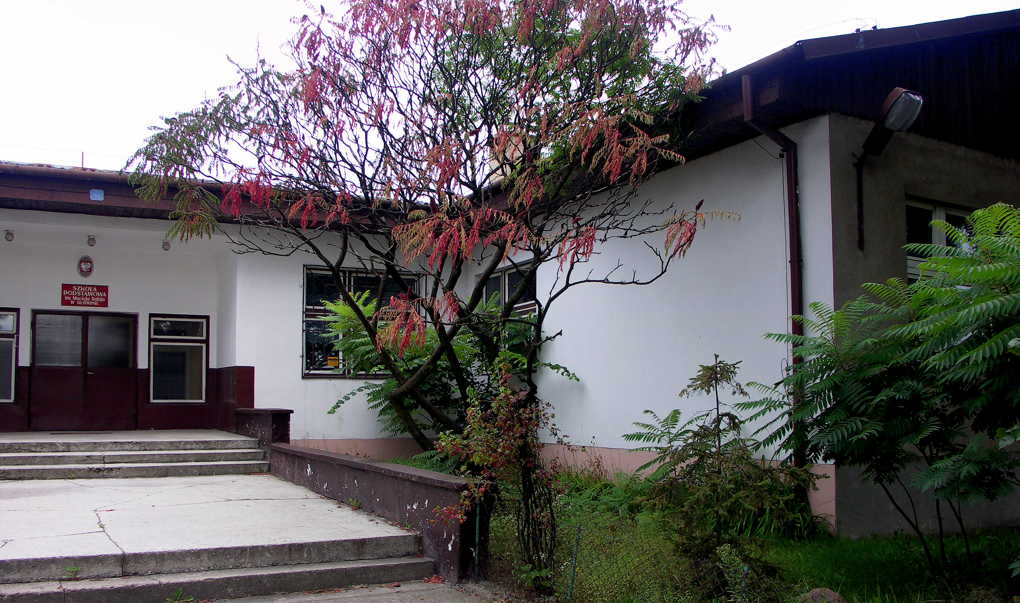 Szkoła Podstawowa im. Macieja Rataja w Główinie (zlikwidowana)